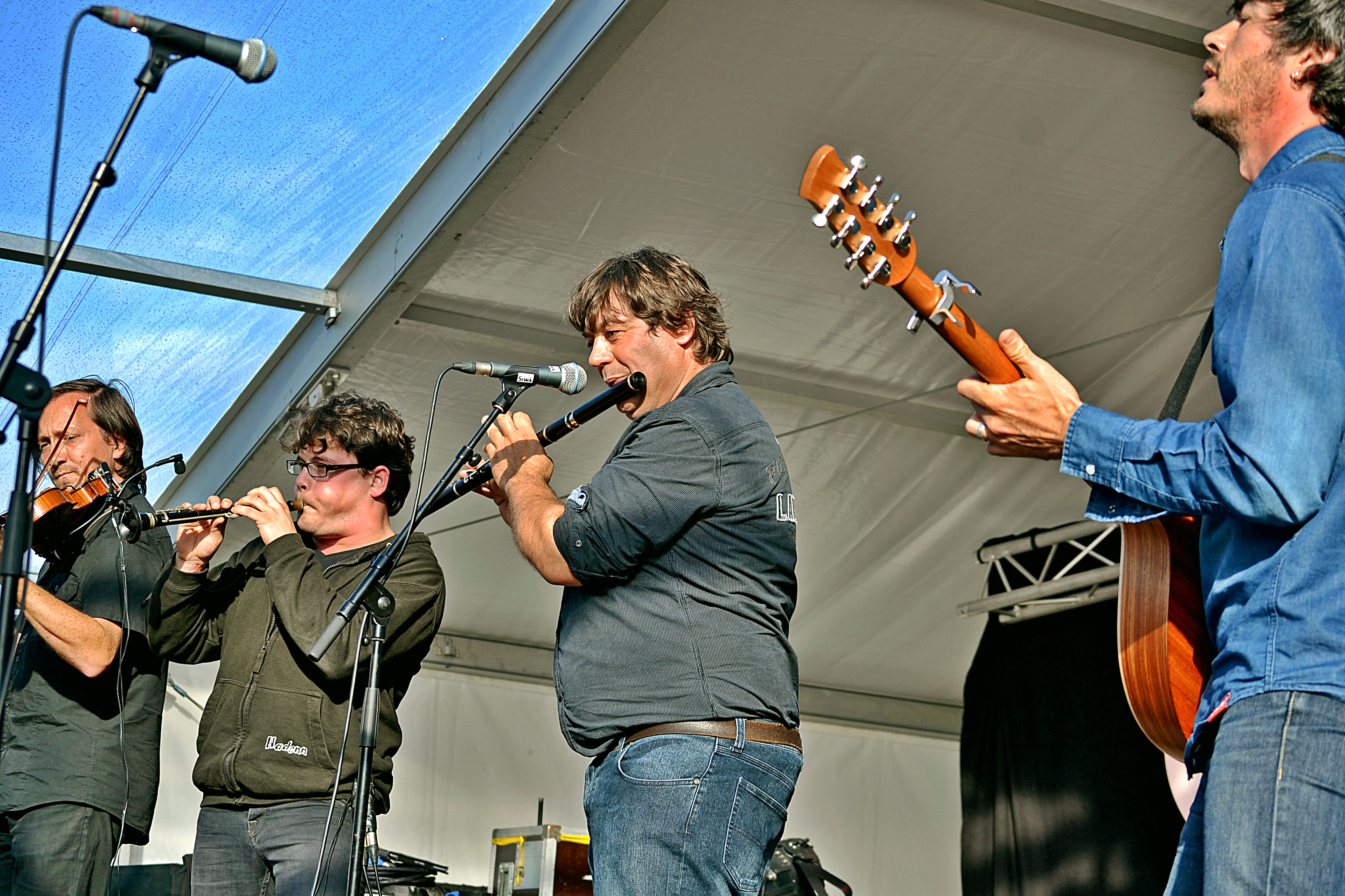 TiTom en concert au festival de Cornouaille à Quimper le 26 juillet 2015.